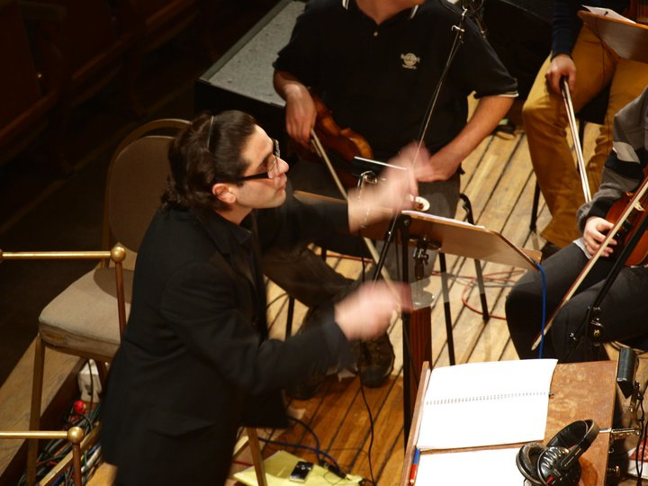 Rudolfinum, Marios Christou (diriguje Missa Graeca)